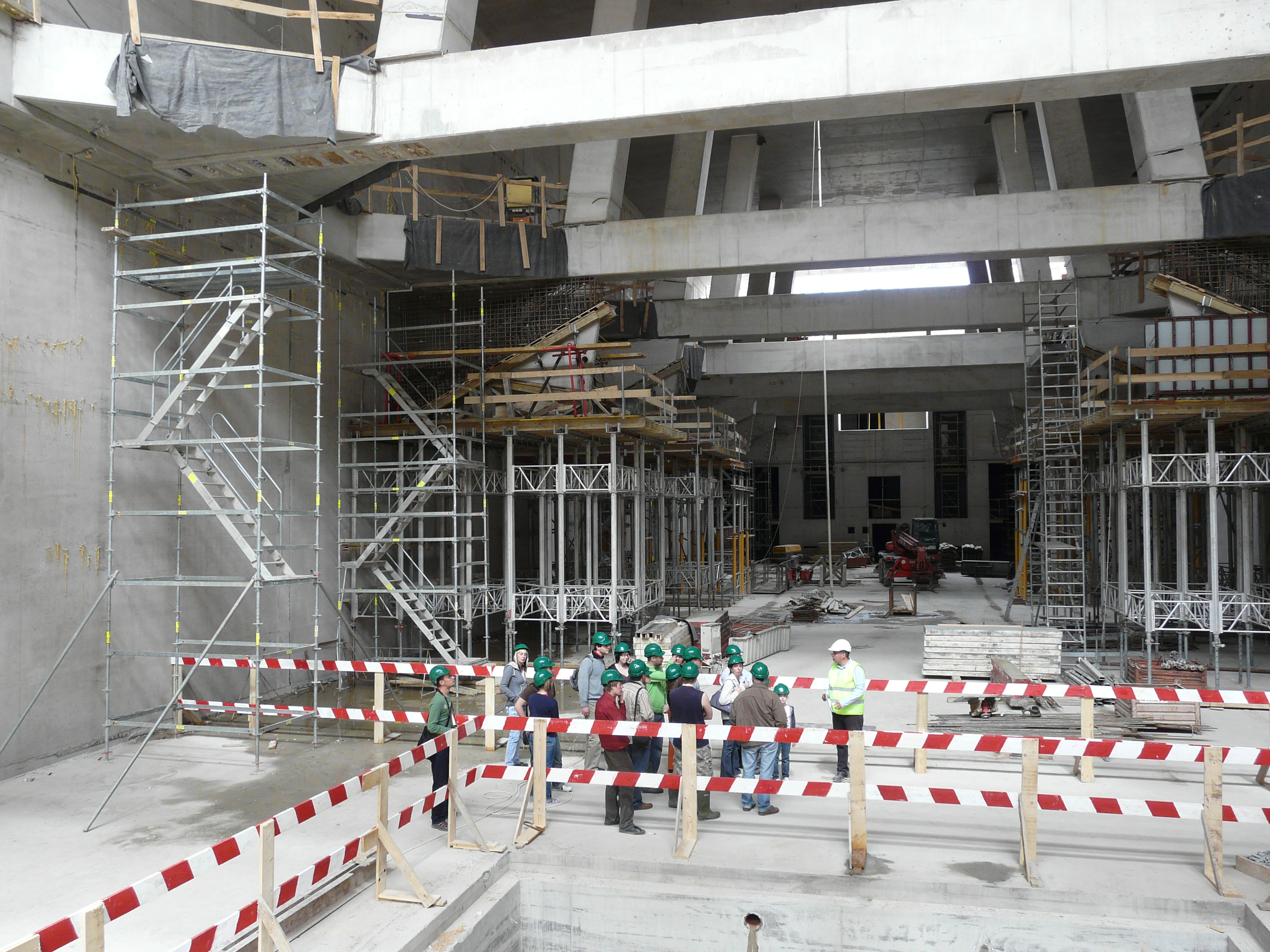 A felvétel a budapesti 4-es metró építésén, a Keleti pu. alatt készült. A DBR METRÓ Project Igazgatóság az Urbitális Majális programsorozat keretében megnyitotta metróépítkezés kapuit a látogatók előtt.